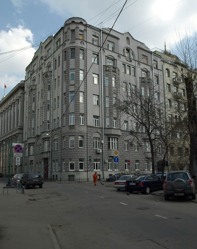 6, Malaya Molchanovka, from Bolshoy Rzhevsky Lane